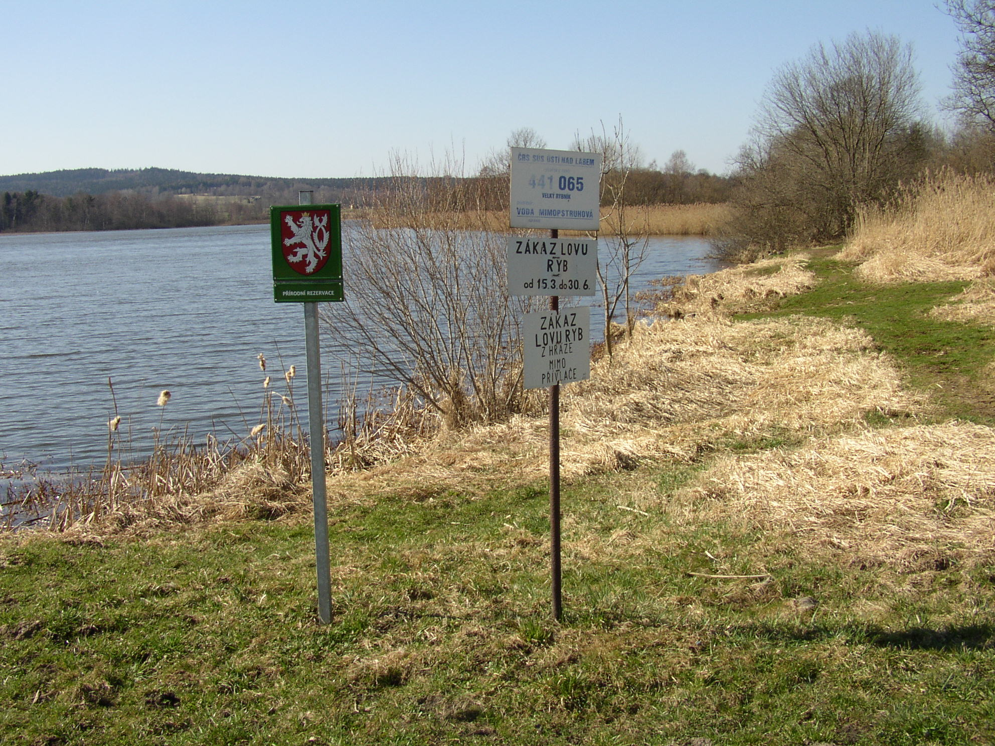 Velký rybník, okres Děčín, Ústecký kraj , Česká republika, cedule přírodní rezervace a o zákazu lovu z hráze